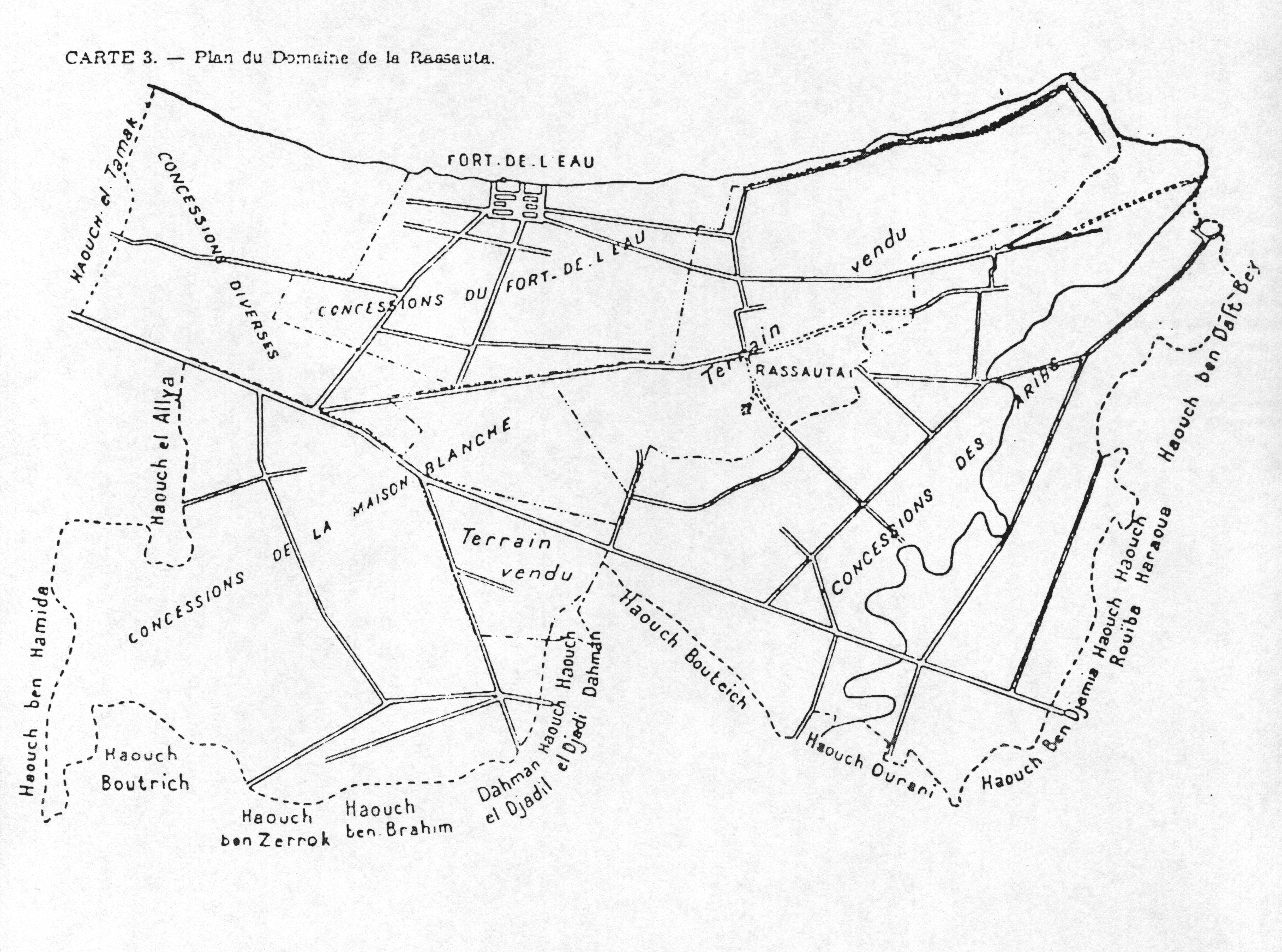 Plan du domaine de la Rassauta (Ras El Outa)